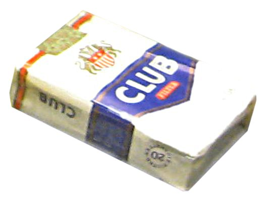 Club-Zigaretten, DDR-Museum Berlin